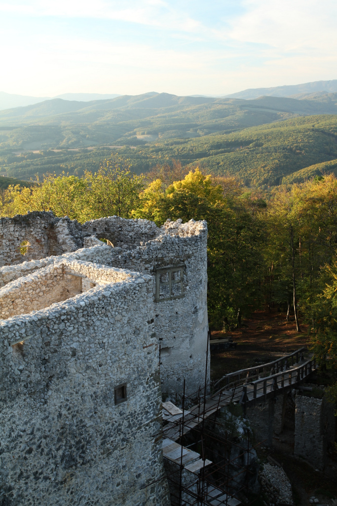 Palác hradný